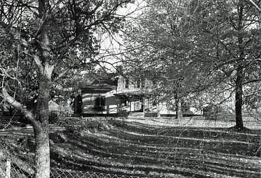 Länna gästgivaregård 1962, vy från väst